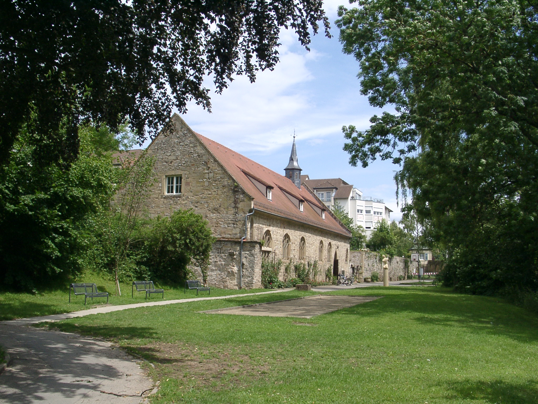 Lauffen am Neckar